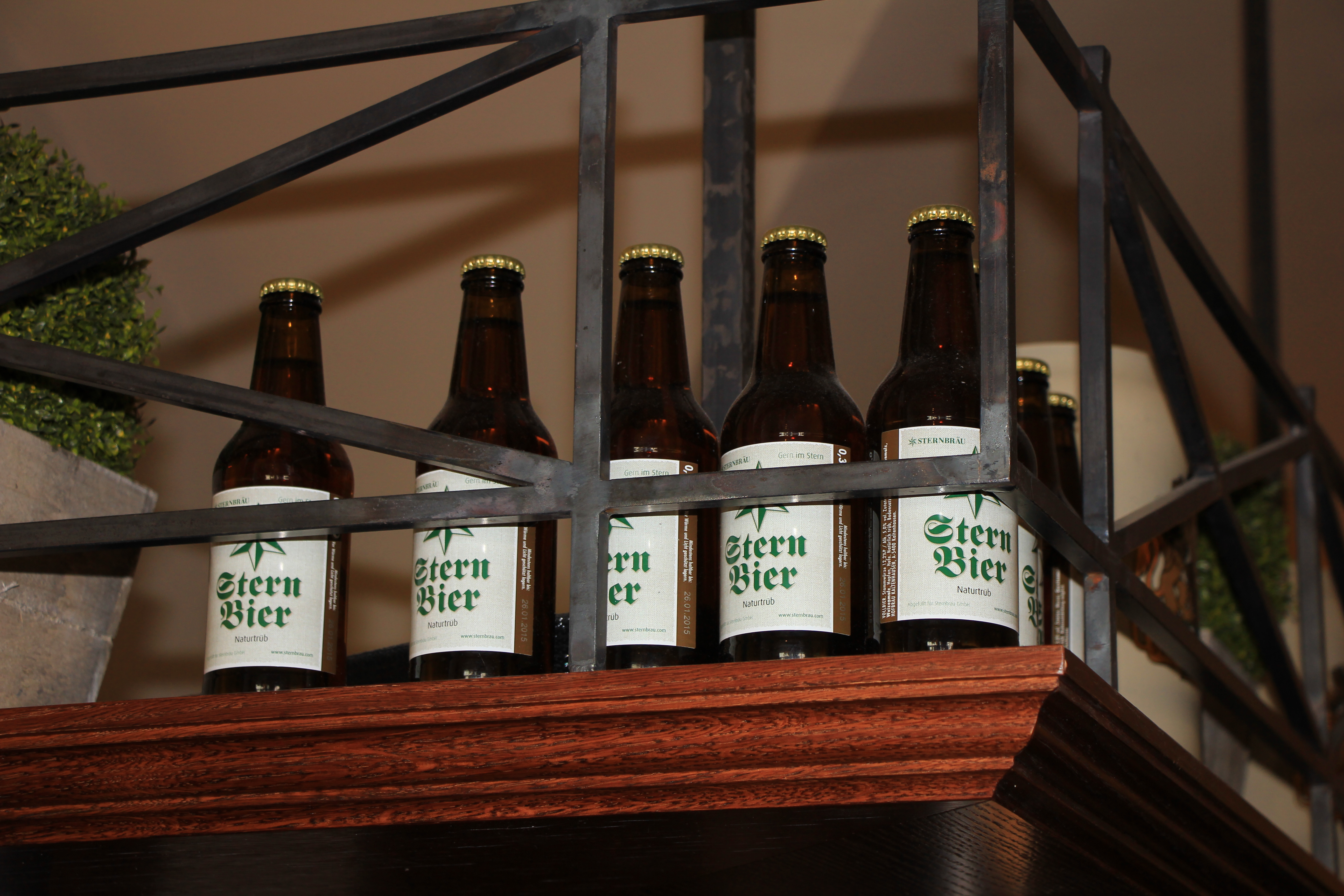 Stern-Bier im Sternbräu in Salzburg